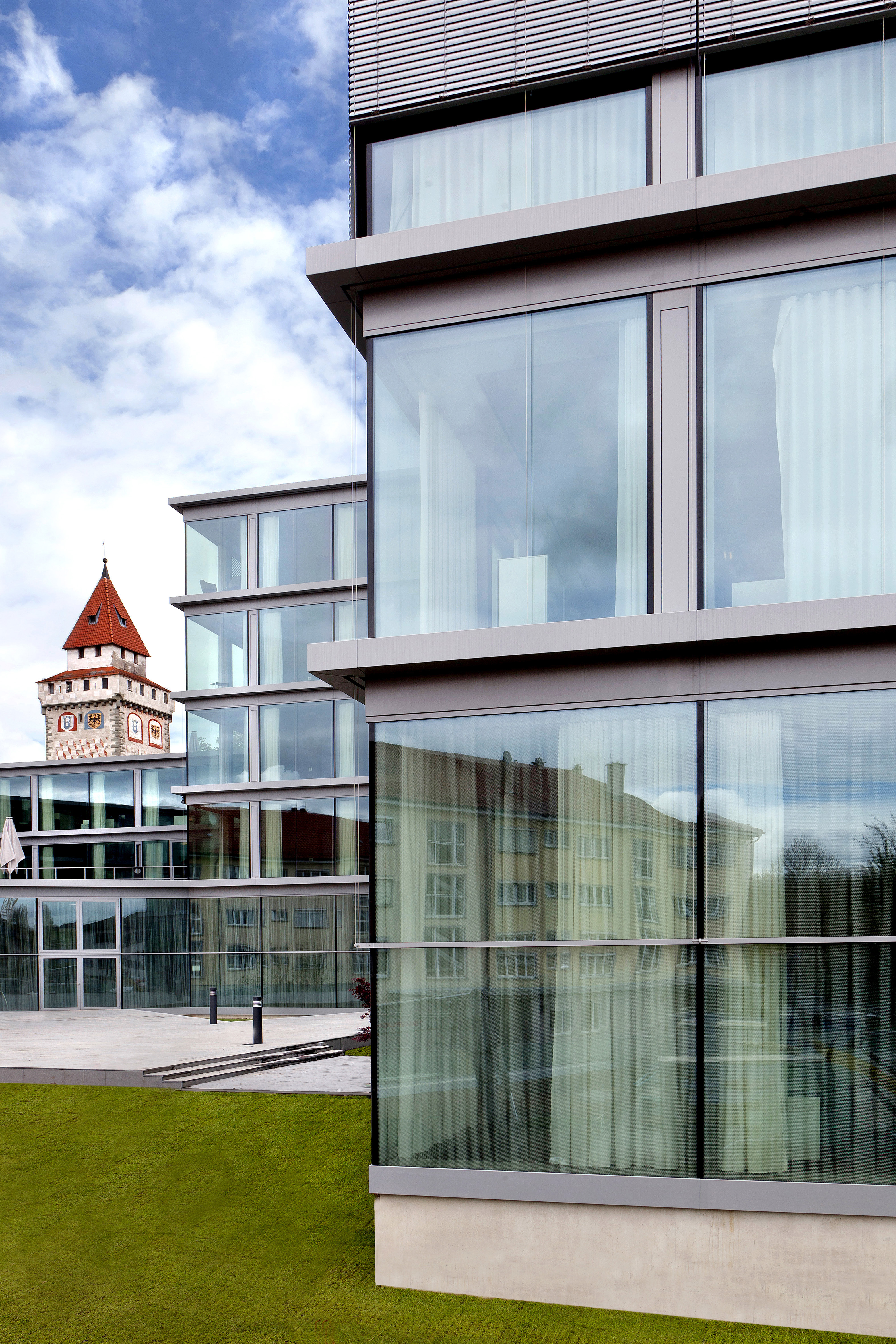 Im gläsernen Neubau sind alle Medien von Schwäbisch Media unter einem Dach